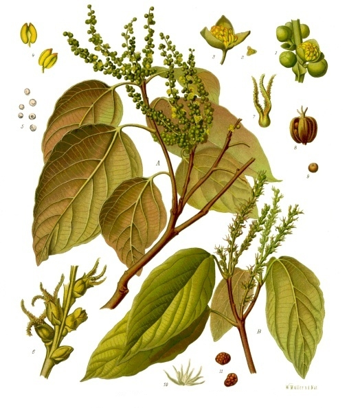 Kamala Baum. A männlicher, B weiblicher Blüthenzweig in nat. Grösse; 1 Theil des männlichen Blüthenstandes, vergrössert; 2 einzelnes Blüthchen, nat. Grösse; 3 dasselbe vergrössert; 4 Staubgefässe, desgl.; 5 Pollen, desgl.; 6 weiblicher Blüthenthenstand, desgl.; 7 weibliche Blüthe ohne Hülle, desgl.; 8 Fruchtkapsel, desgl.; 9 Same, desgl.; 10 Haarbüschel, desgl.; 11 Drüsen, desgl.